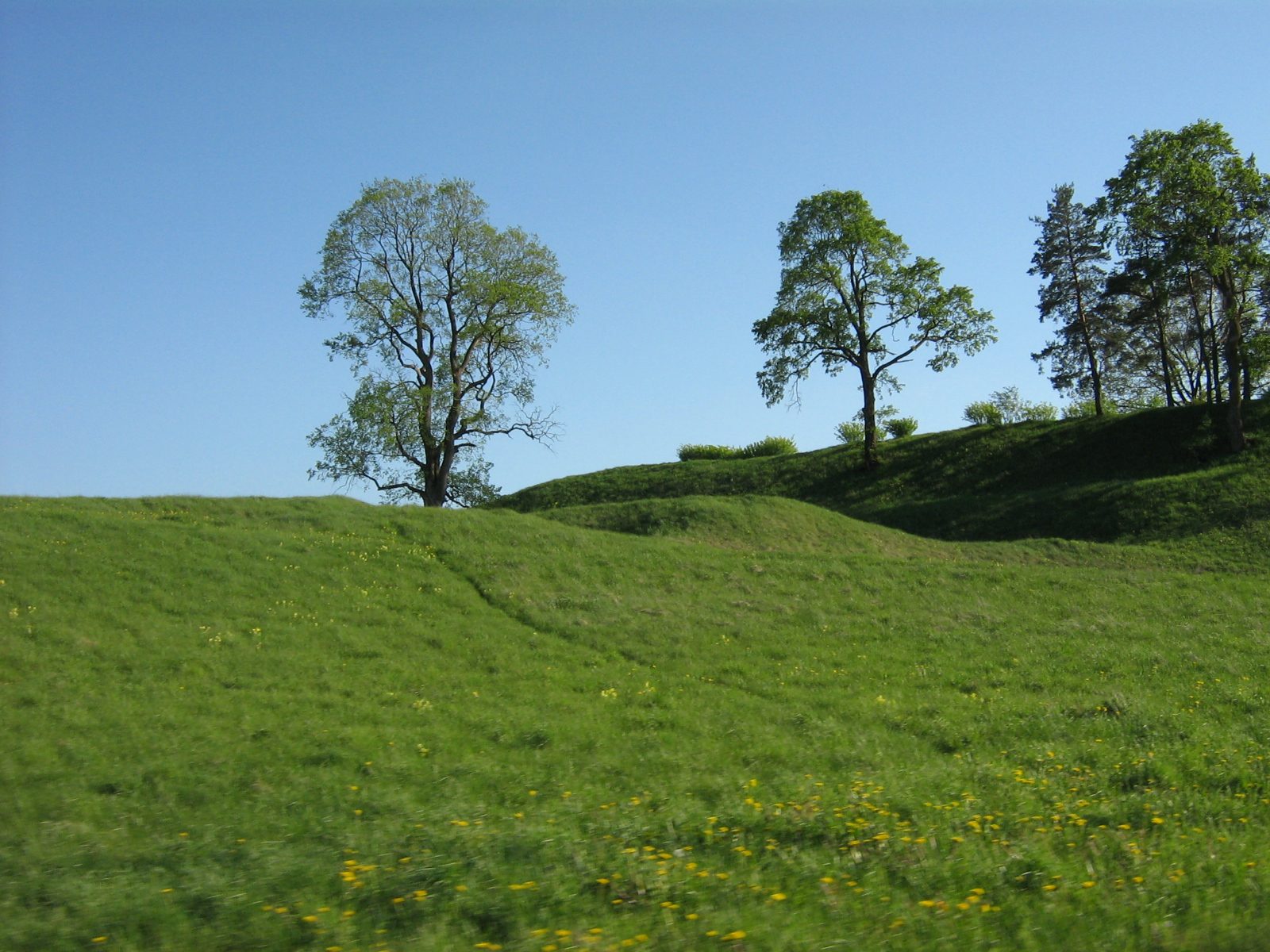 Žvelgaičio kalnas netoli Žagarės.